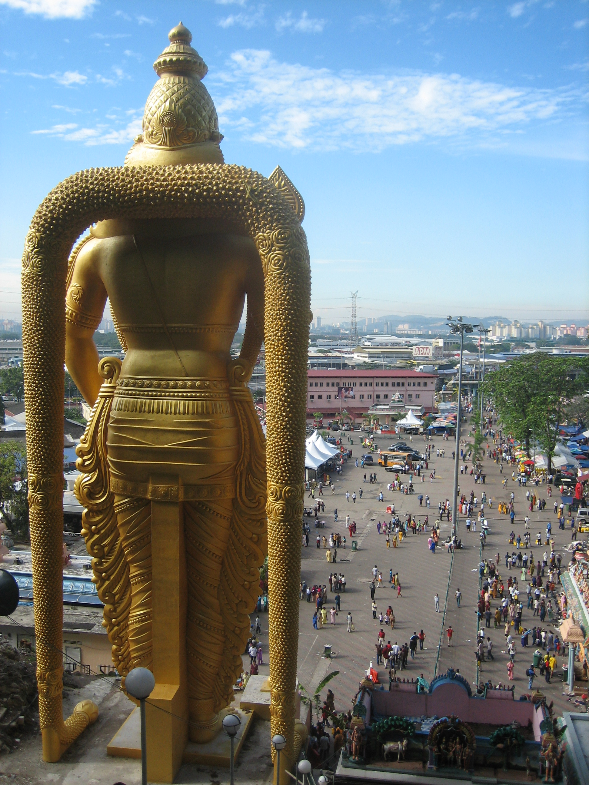 Batu Caves, Kuala Lumpur, Malaysia